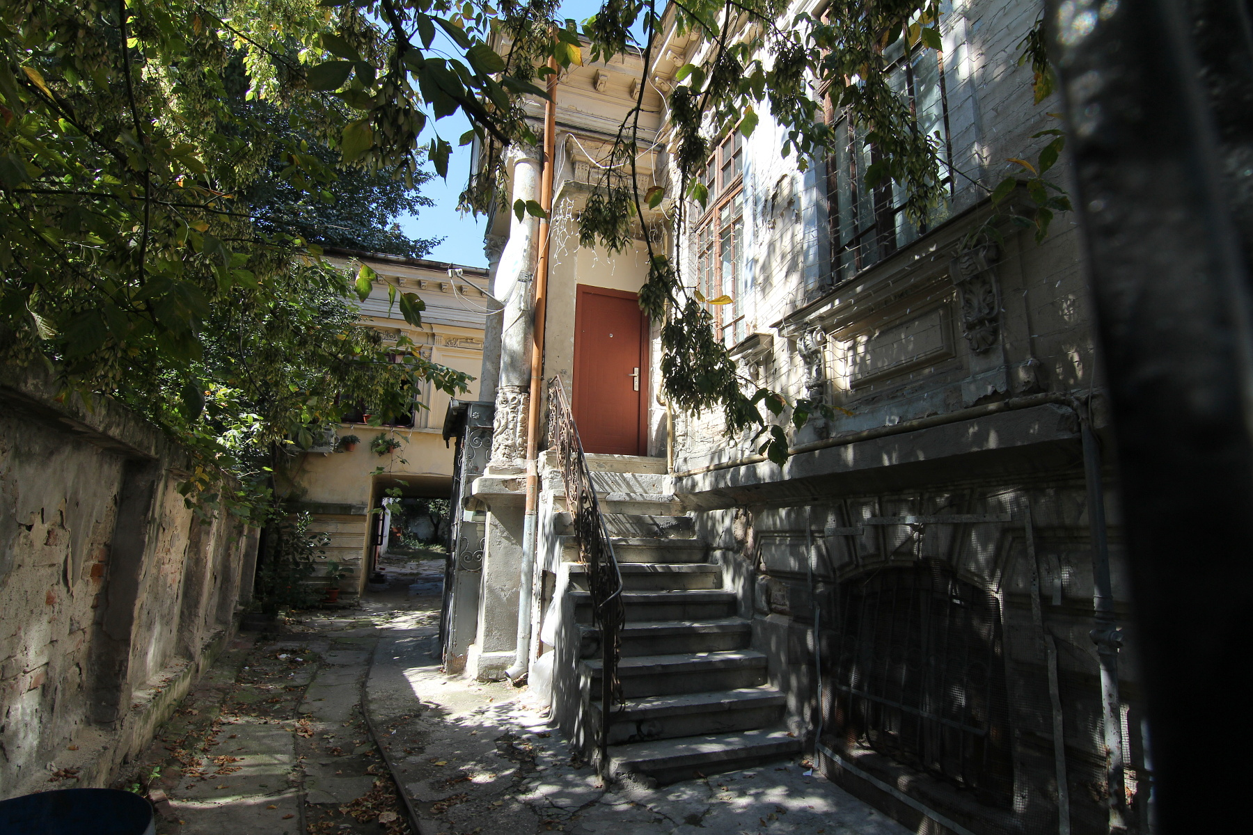 Casă pe strada Traian